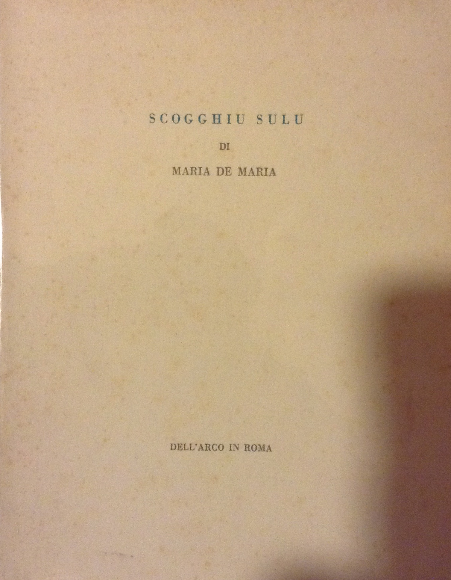 Libro di Maria De Maria